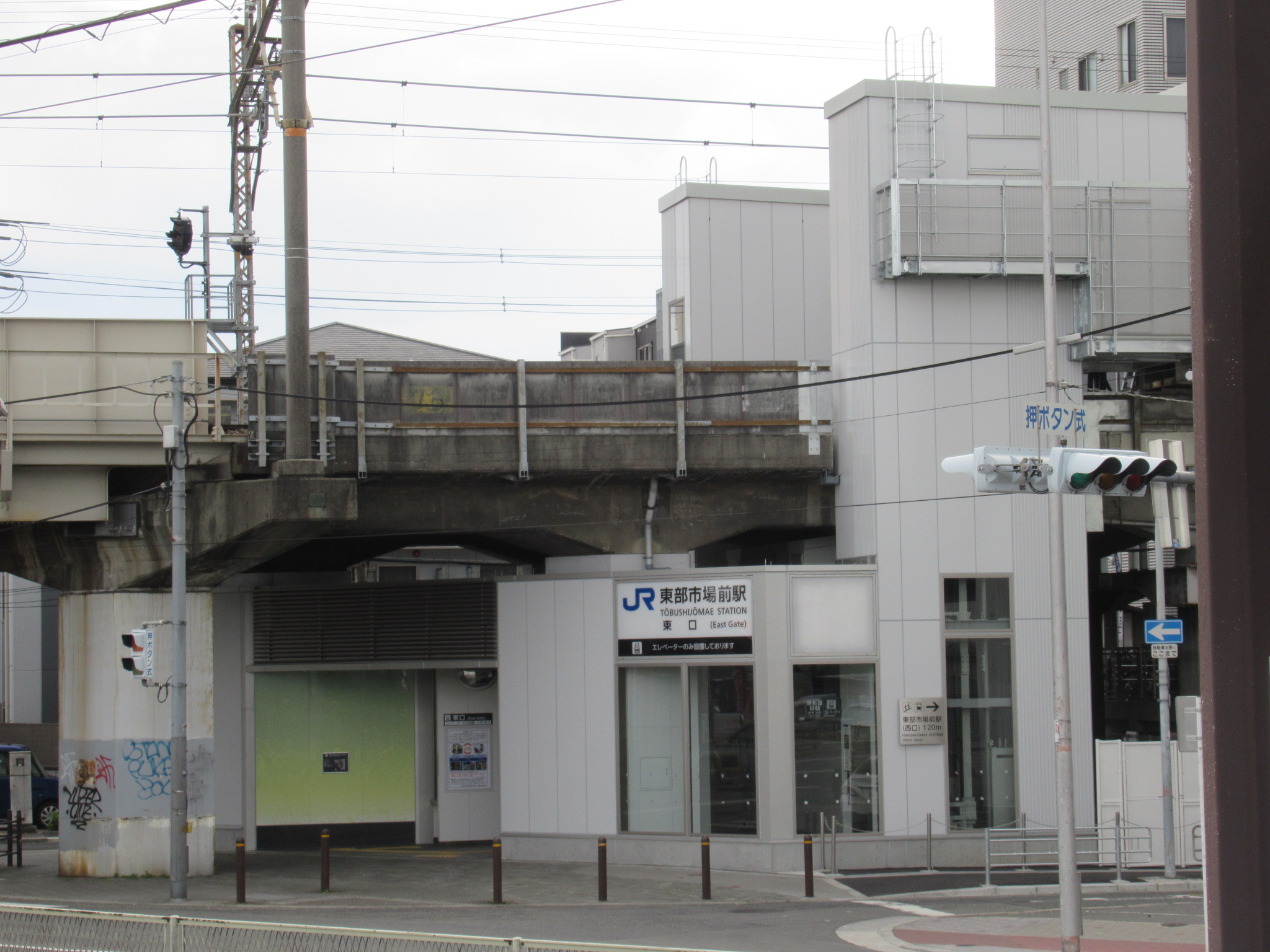 東部市場前駅 東口